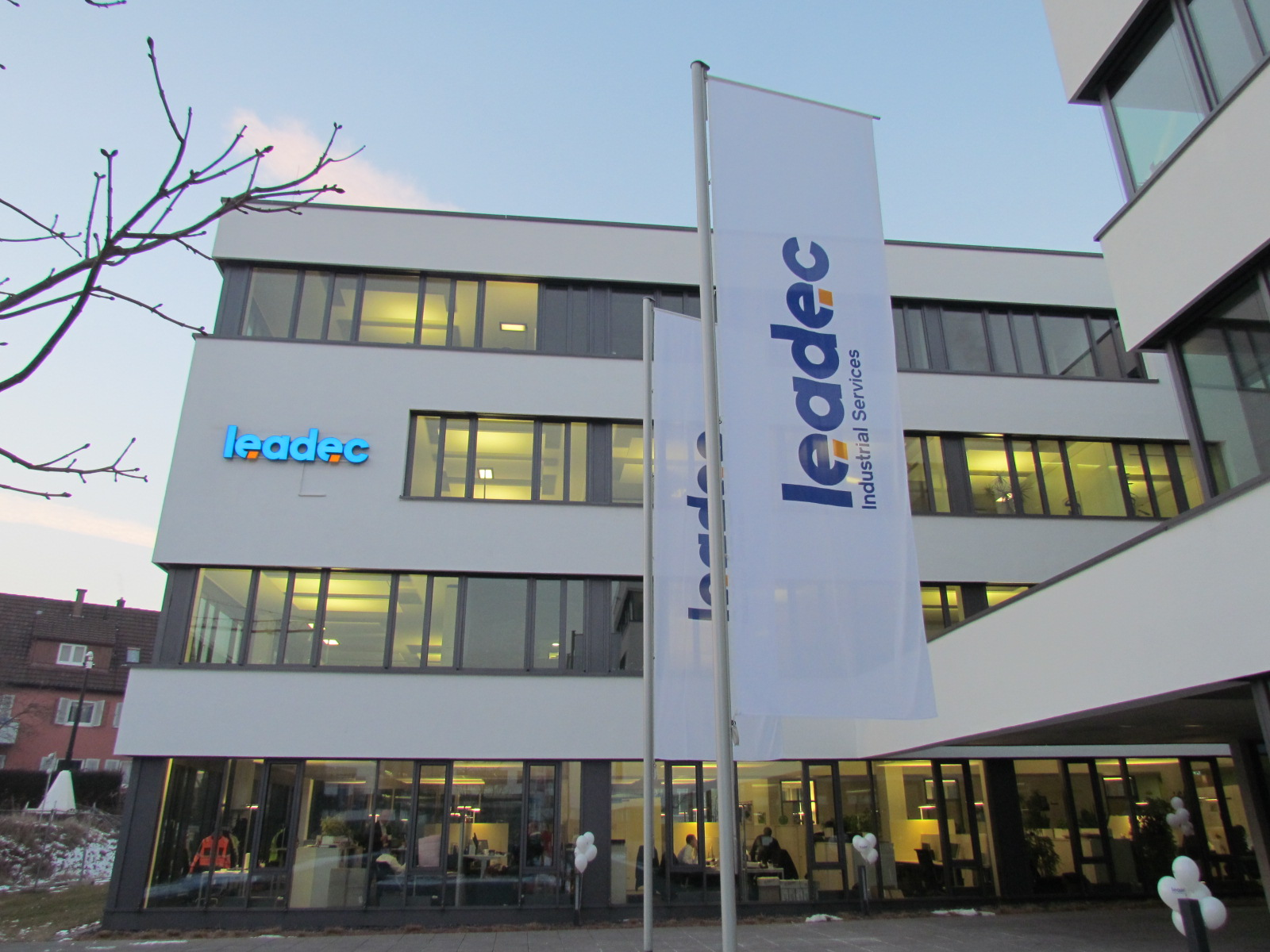 Leadec Headquarter Stuttgart